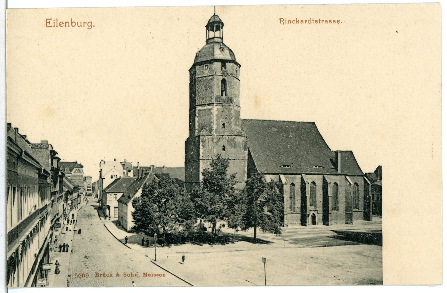 Eilenburg; Rinckardtstraße This postcard is from publisher Brück & Sohn in Meißen ( This postcard has a unique number 05009 and is available in a higher resolution at the publisher. This images was uploaded in a cooperation project between Wikipedians and the publisher.